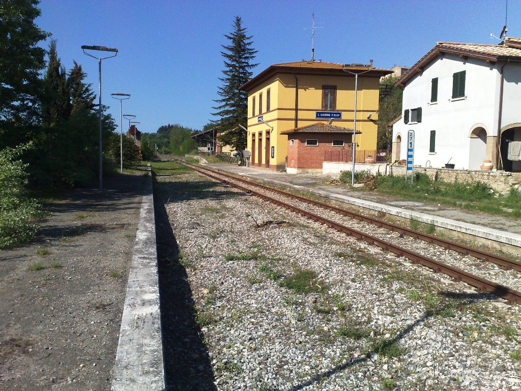 Vista d'insieme della Stazione di San Giovanni d'Asso